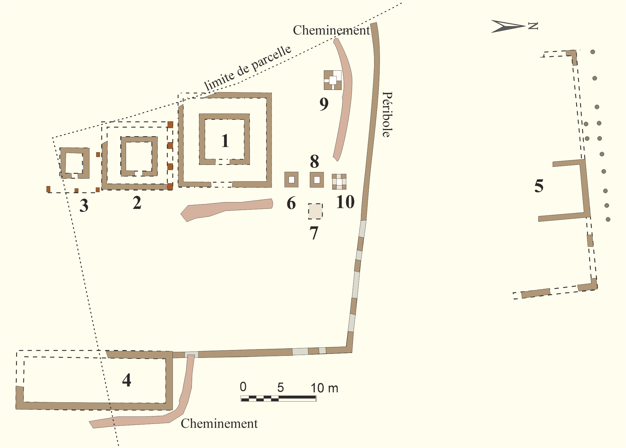 Plan d'ensemble du sanctuaire des Pièces-Grandes à Margerides